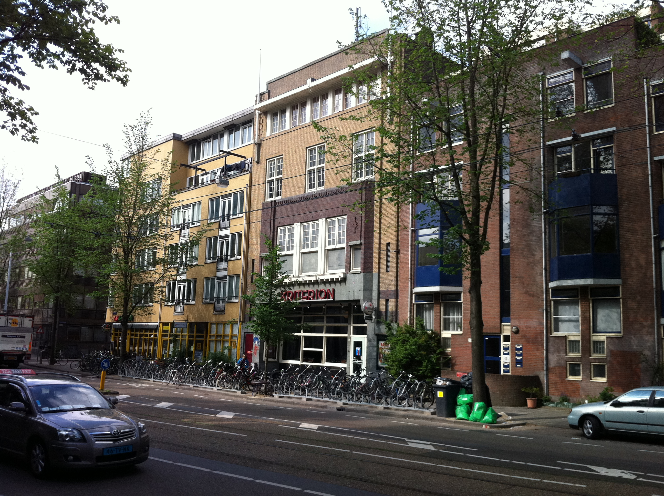 Roetersstraat 34-36 Amsterdam, waar tegenwoordig Filmtheater Kriterion is gevestigd. Thuisbasis van de Handwerkers Vriendenkring, na de Tweede Wereldoorlog studentenbioscoop